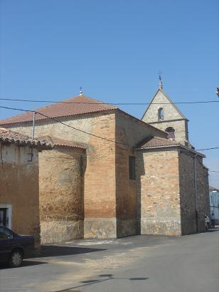 Iglesia del pueblo. Iglesia de Camarzana de Tera (Zamora)